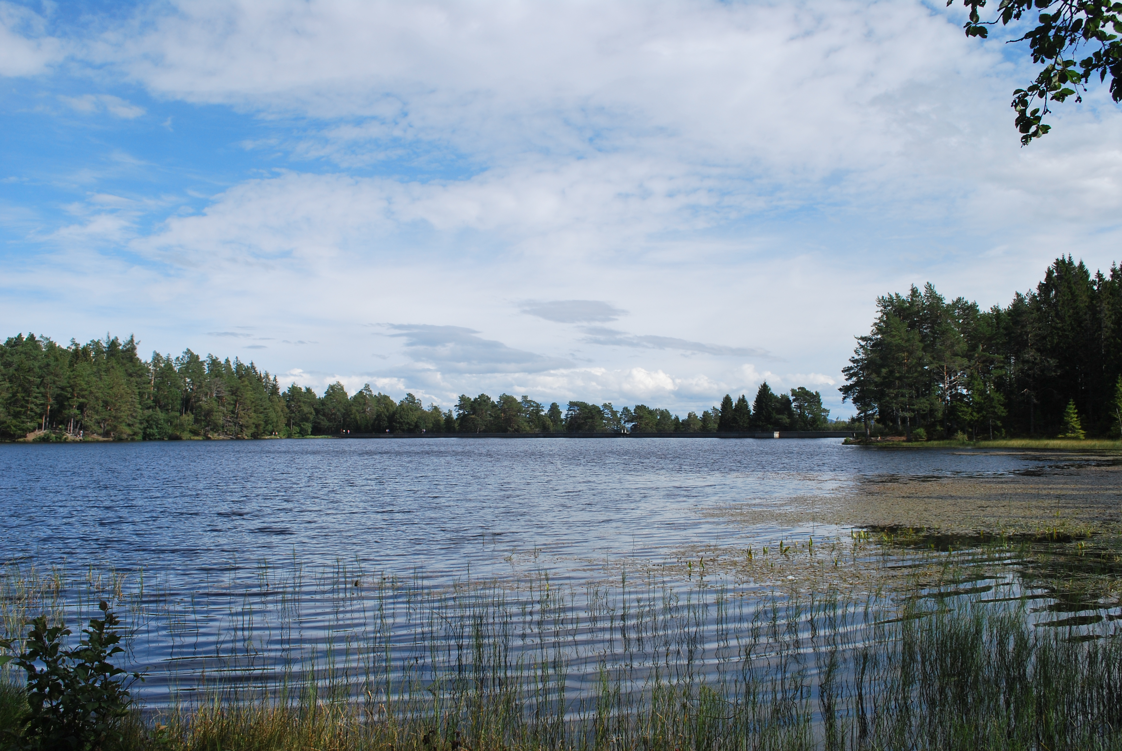 Baklidammen i Bymarka i Trondheim